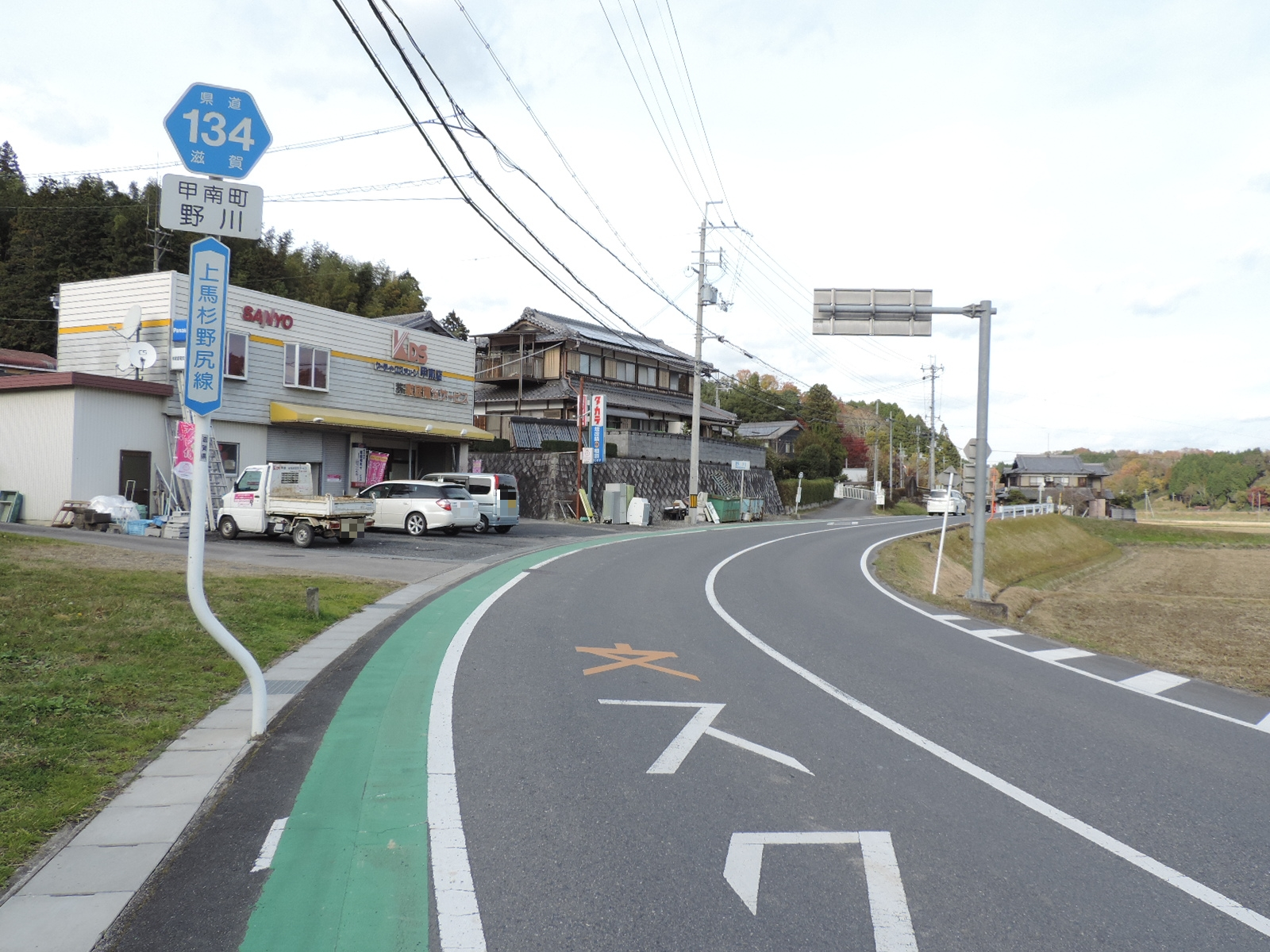 滋賀県道134号上馬杉野尻線、甲賀市甲南町野川にて。2017年撮影